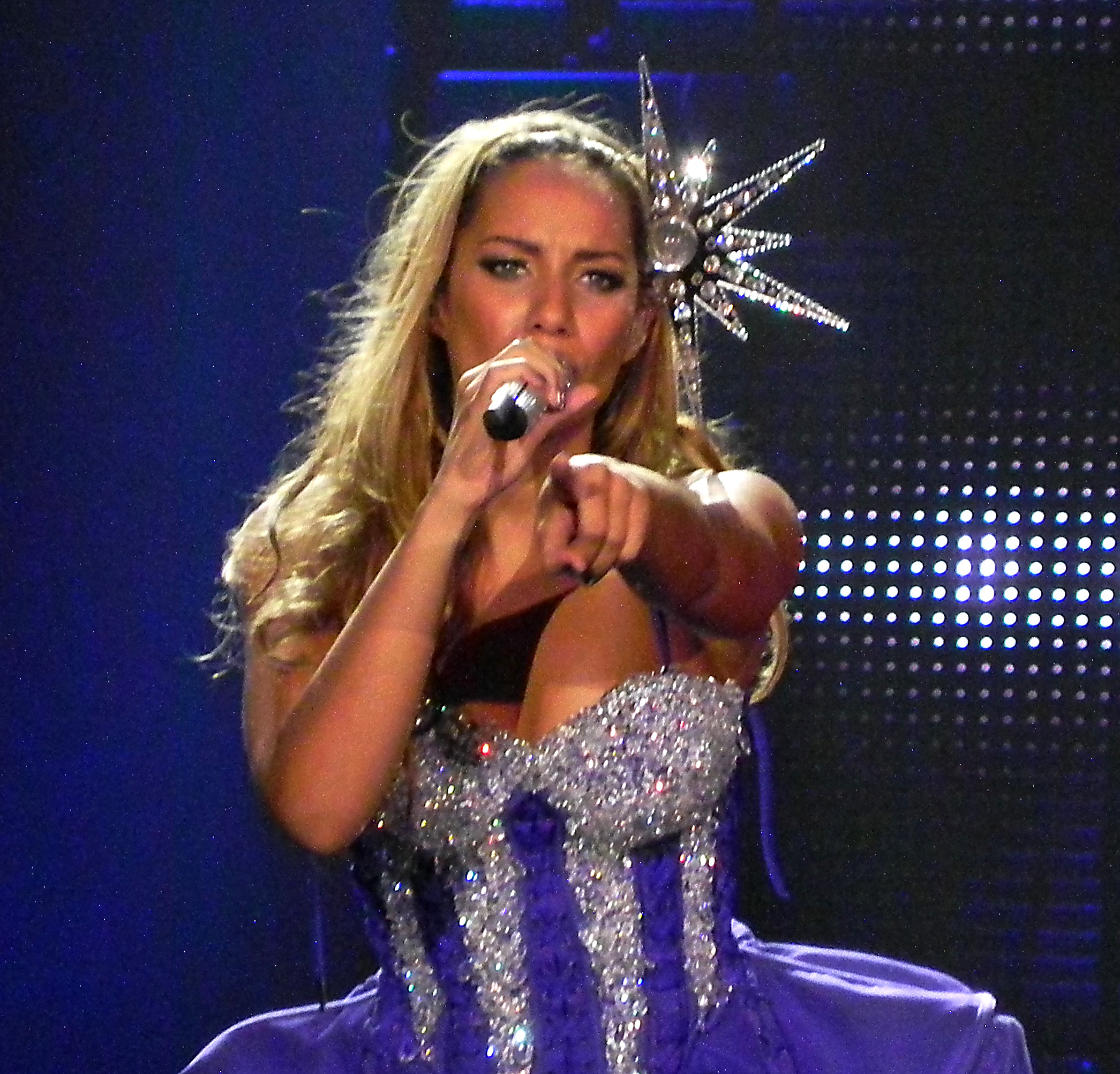 Leona Lewis durante a sua turnê "The Labyrinth" (em português: O Labirinto)